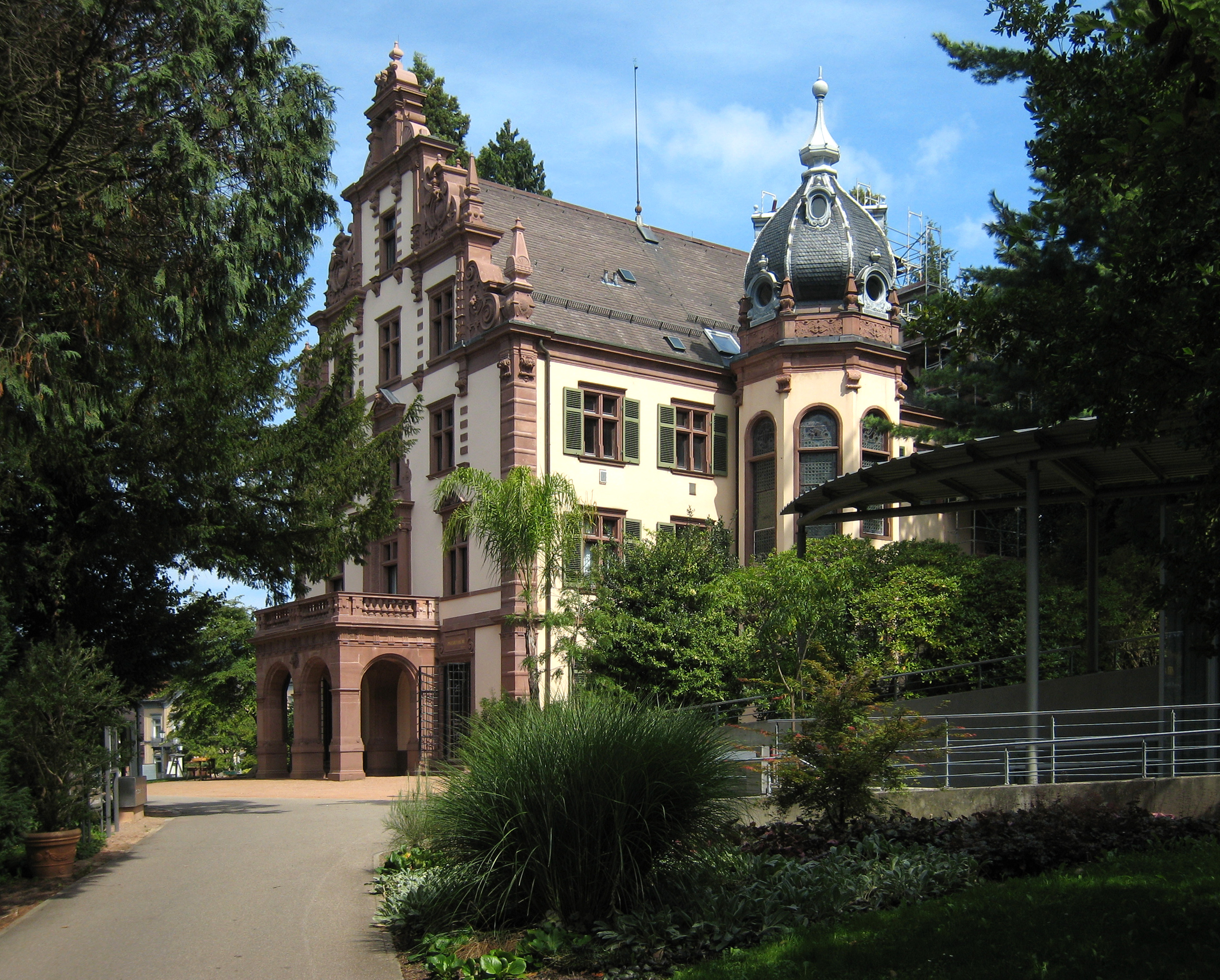 Ehemaliges Großherzogliches Palais in Badenweiler. Badenweiler/Süd-Schwarzwald/Deutschland